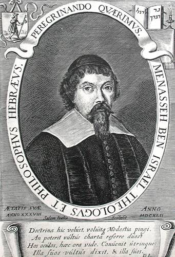 Amsterdam